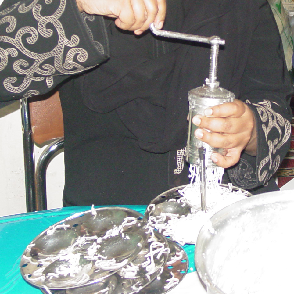 നൂൽ പുട്ട് താളിനു വേണ്ടി..